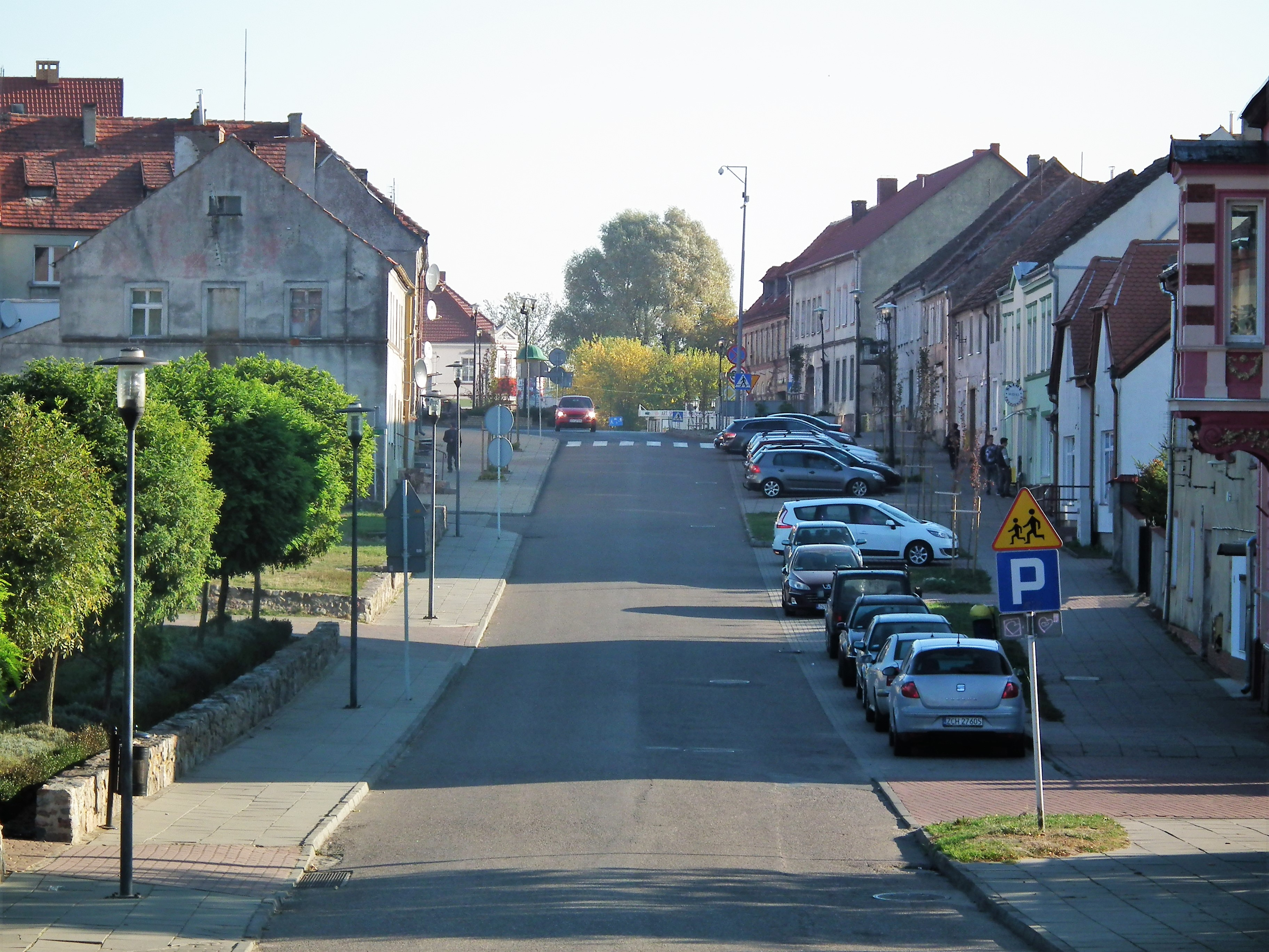 Centrum Pełczyc.